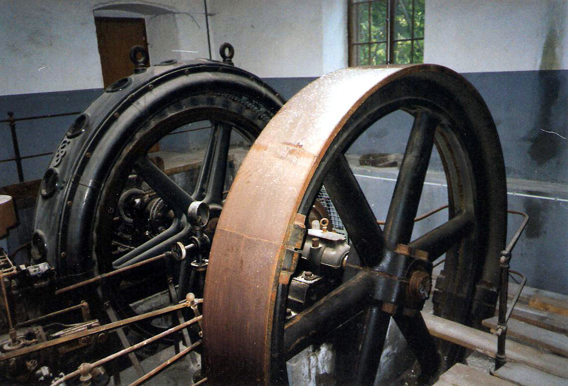 Drehstromgenerator und Schwungrad von 1895 des Kraftwerks Stallegg. Von 1895 bis 1979 als zweites Drehstromkraftwerk Deutschlands ununterbrochen in Betrieb. Rechts die abgetrennte Antriebswelle zur einstigen Franzisturbine.